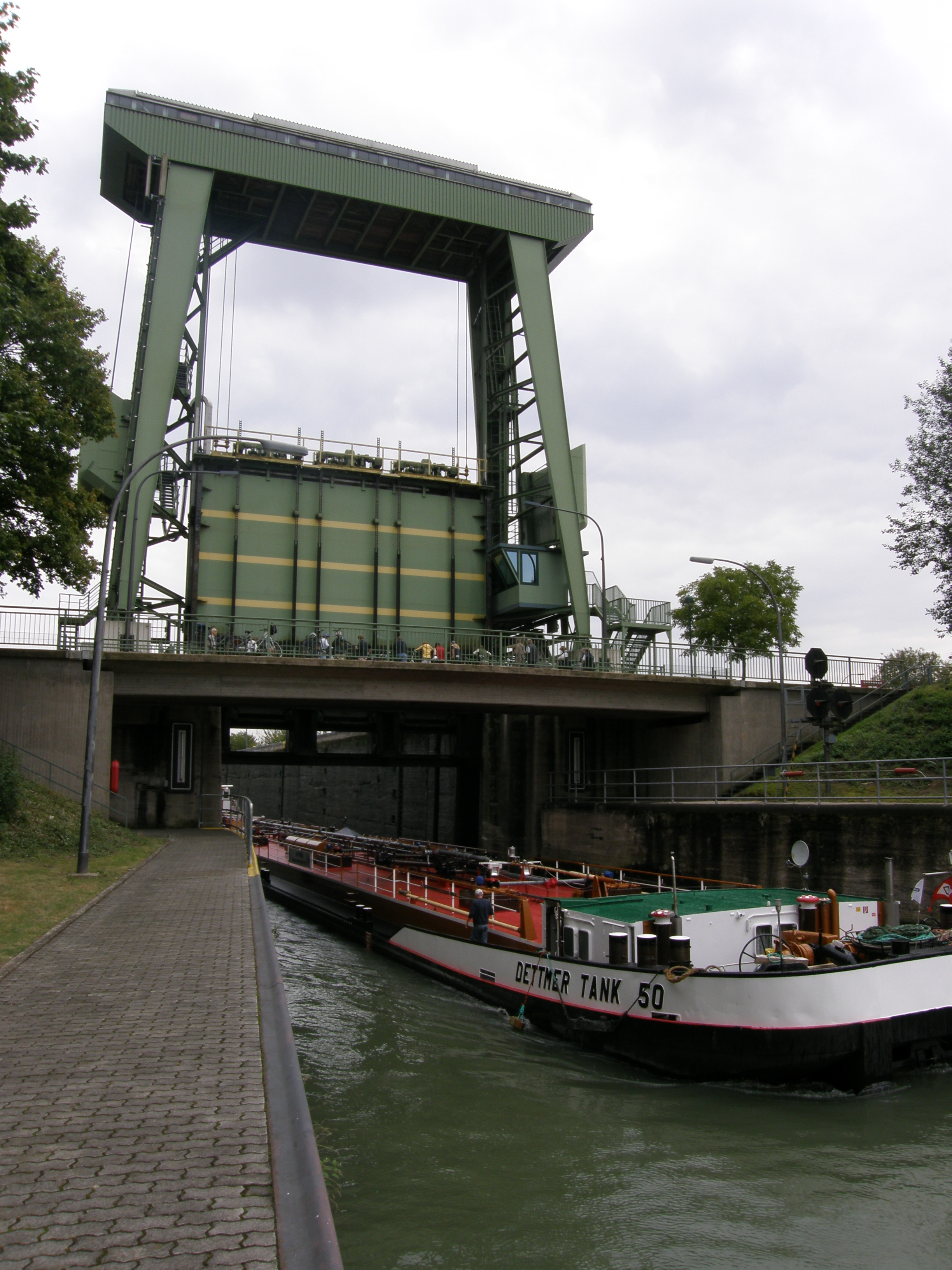 Schleuse Ahsen des Wesel-Datteln-Kanals Ausfahrt der "Dettmer Tank 50" aus der großen Schleusenkammer in Richtung Tal.